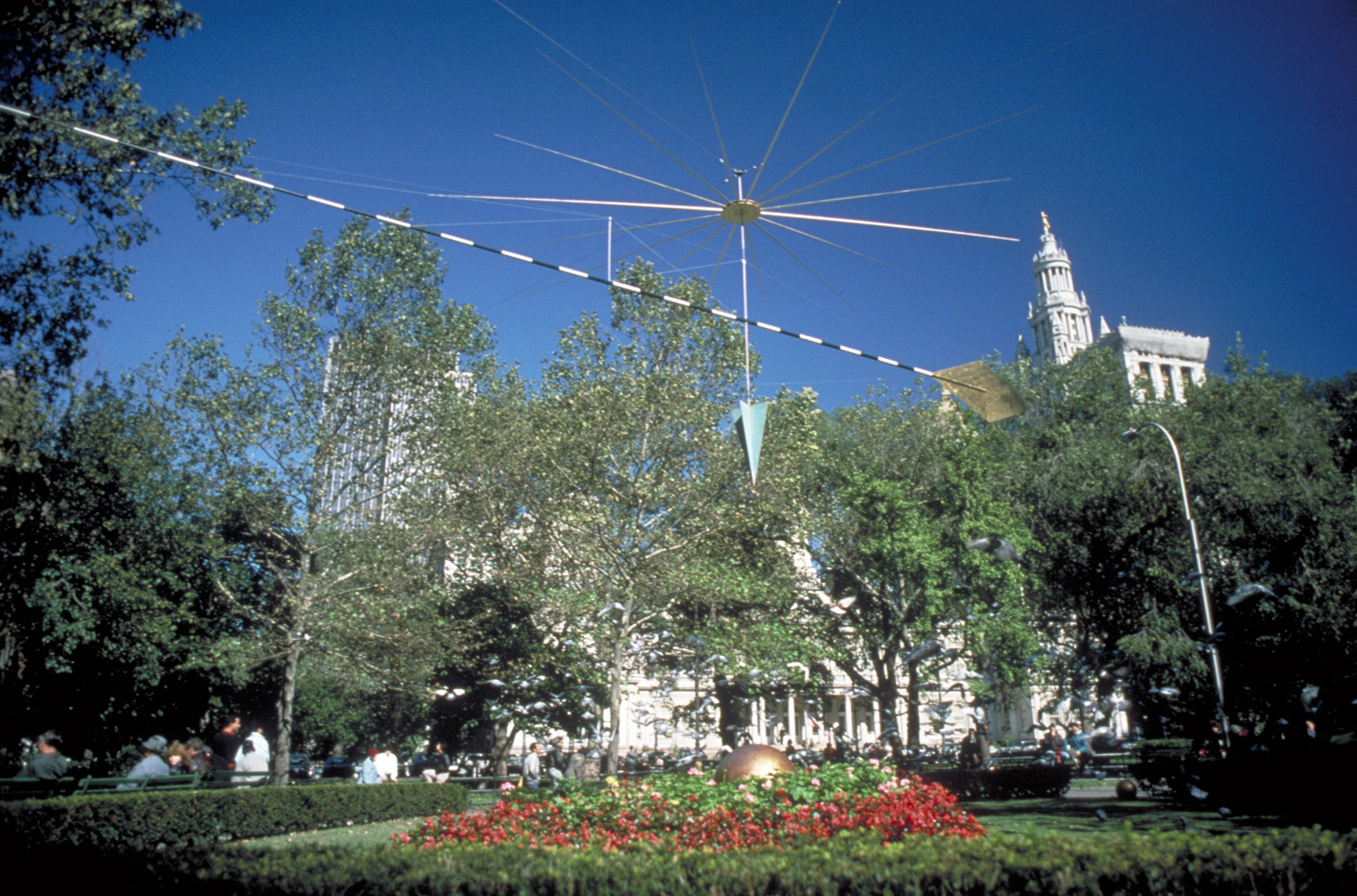 Pananemone, 1987 (Kristin Jones, Andrew Ginzel)